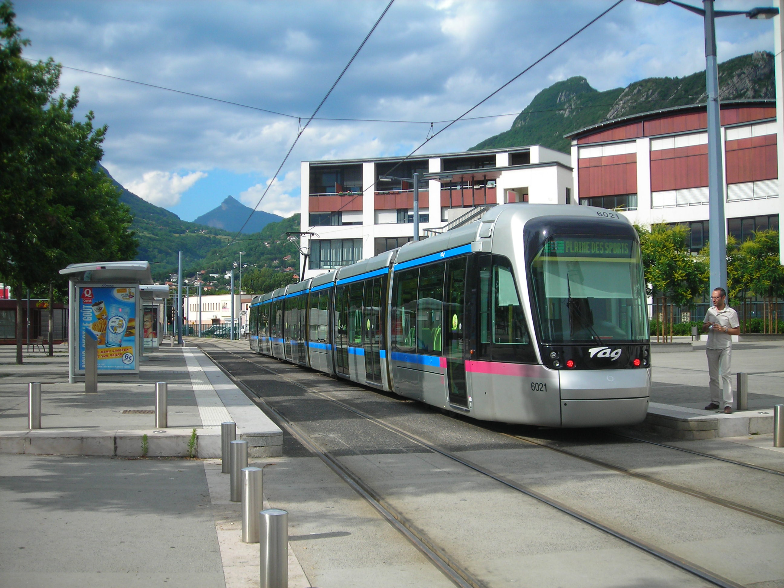 Tramway Alstom Citadis 402 du réseau TAG de Grenoble au terminus Cité Internationale de la ligne B.